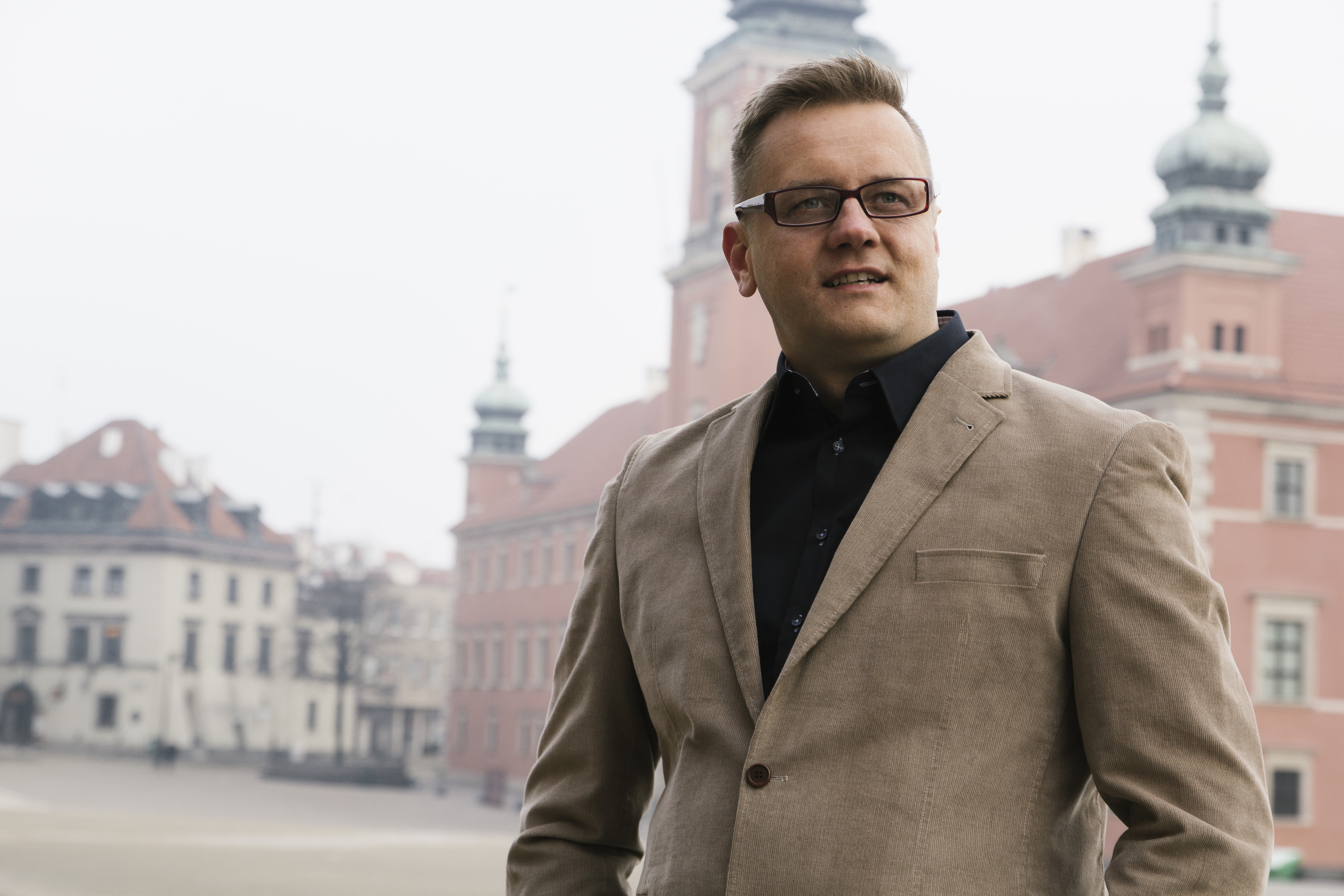 Kandydat na prezydenta RP Paweł Tanajno przed Zamkiem Królewskim